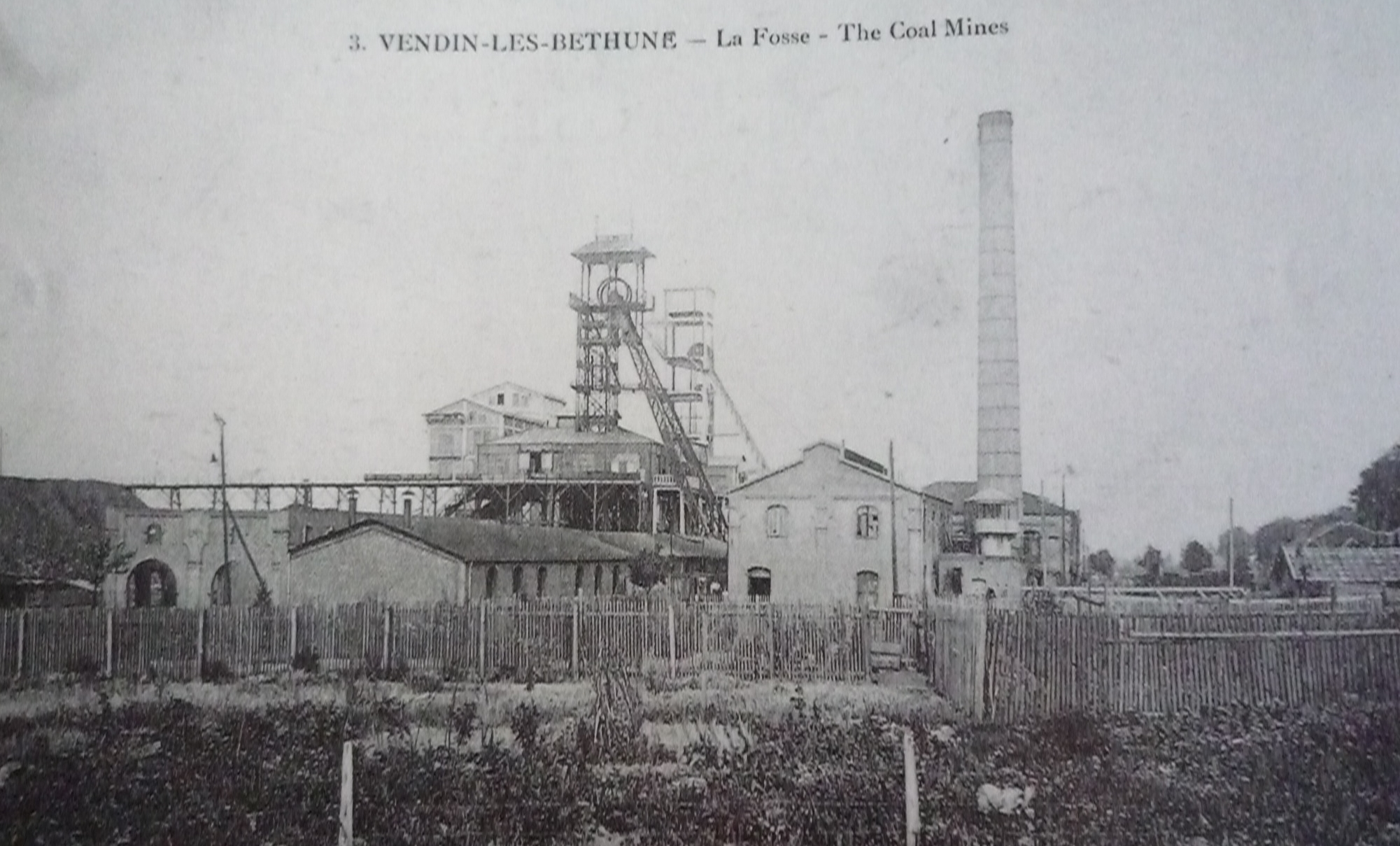 La Fosse n° 1 - 1 bis de la Compagnie des Charbonnages de Vendin-lez-Béthune était un charbonnage constitué de deux puits situé à Vendin-lès-Béthune, Pas-de-Calais, Nord-Pas-de-Calais, France.